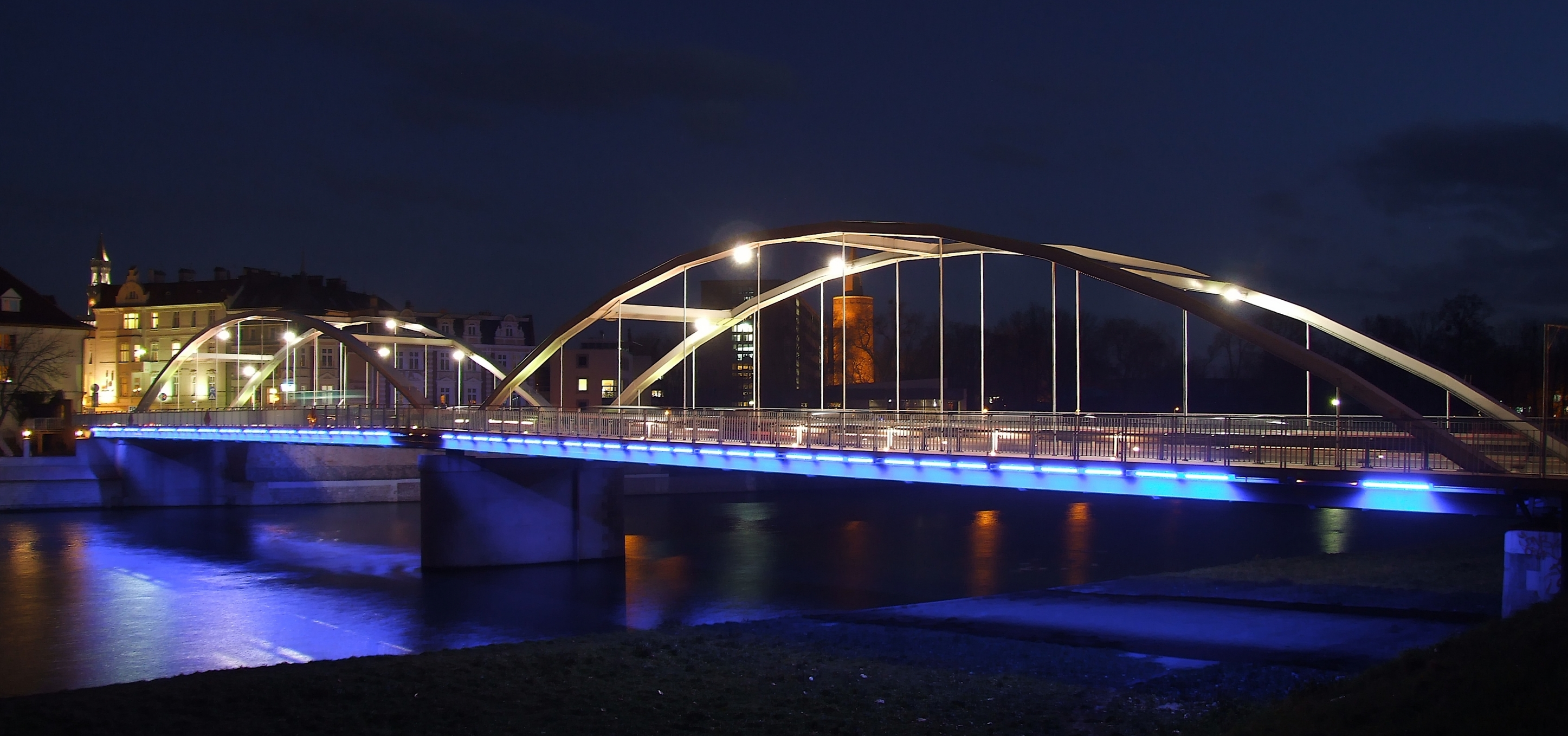 Most Piastowski w Opolu Ślůnski: Pjastowski most we Uopolu